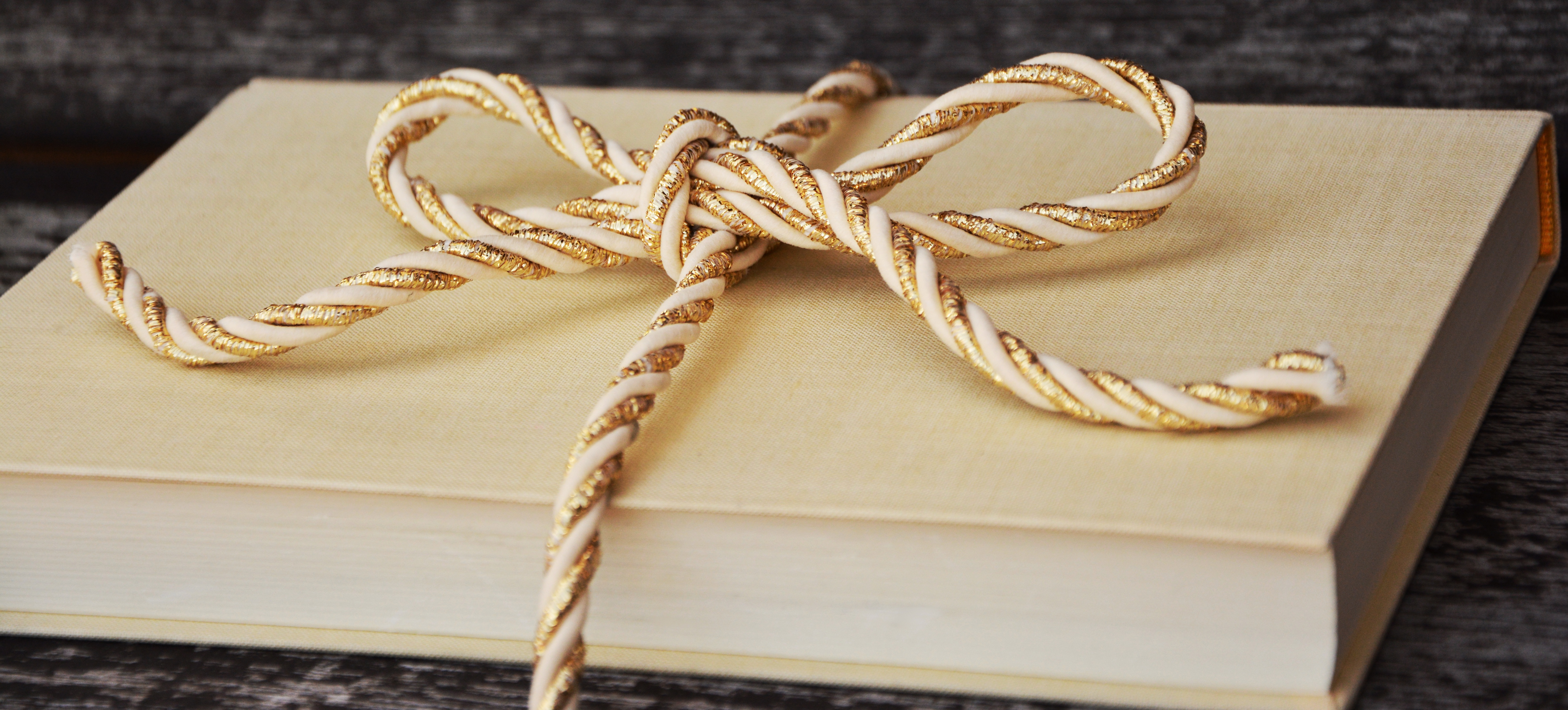 Boek met een wit-gouden koord